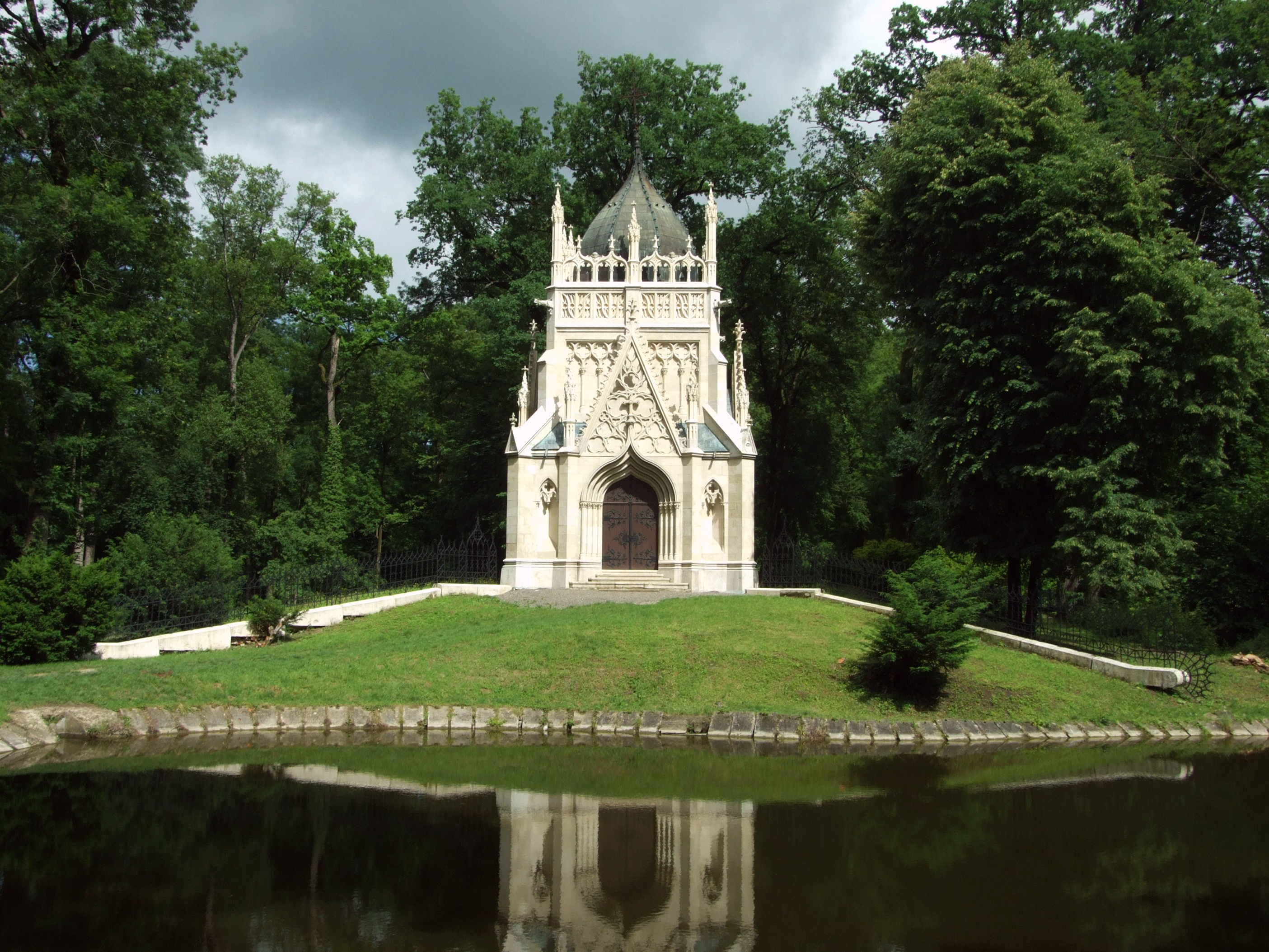 Andrássyovské mauzóleum, arch. Artur Meining, 1893